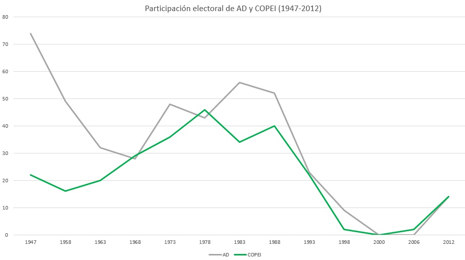 Porcentajes obtenidos por AD y COPEI, desde 1958 hasta 2012.